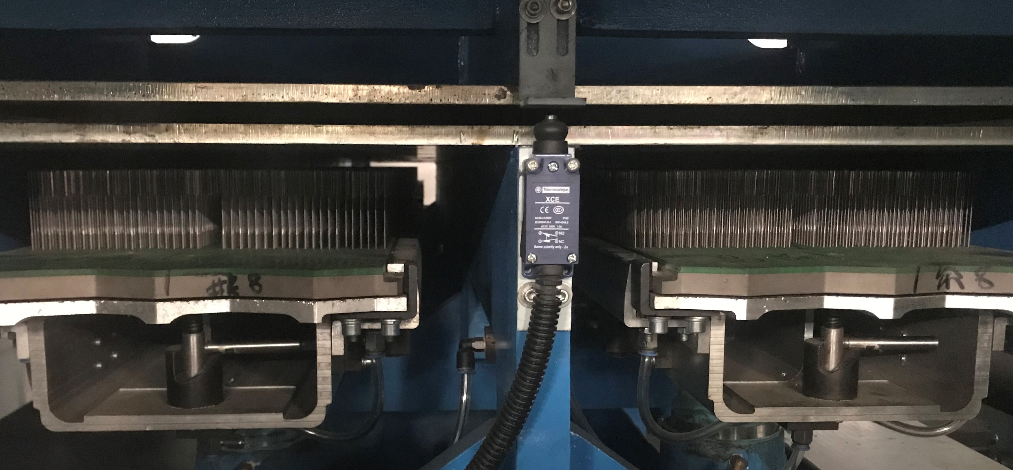 Esempio di impianto di agugliatura ad aghi